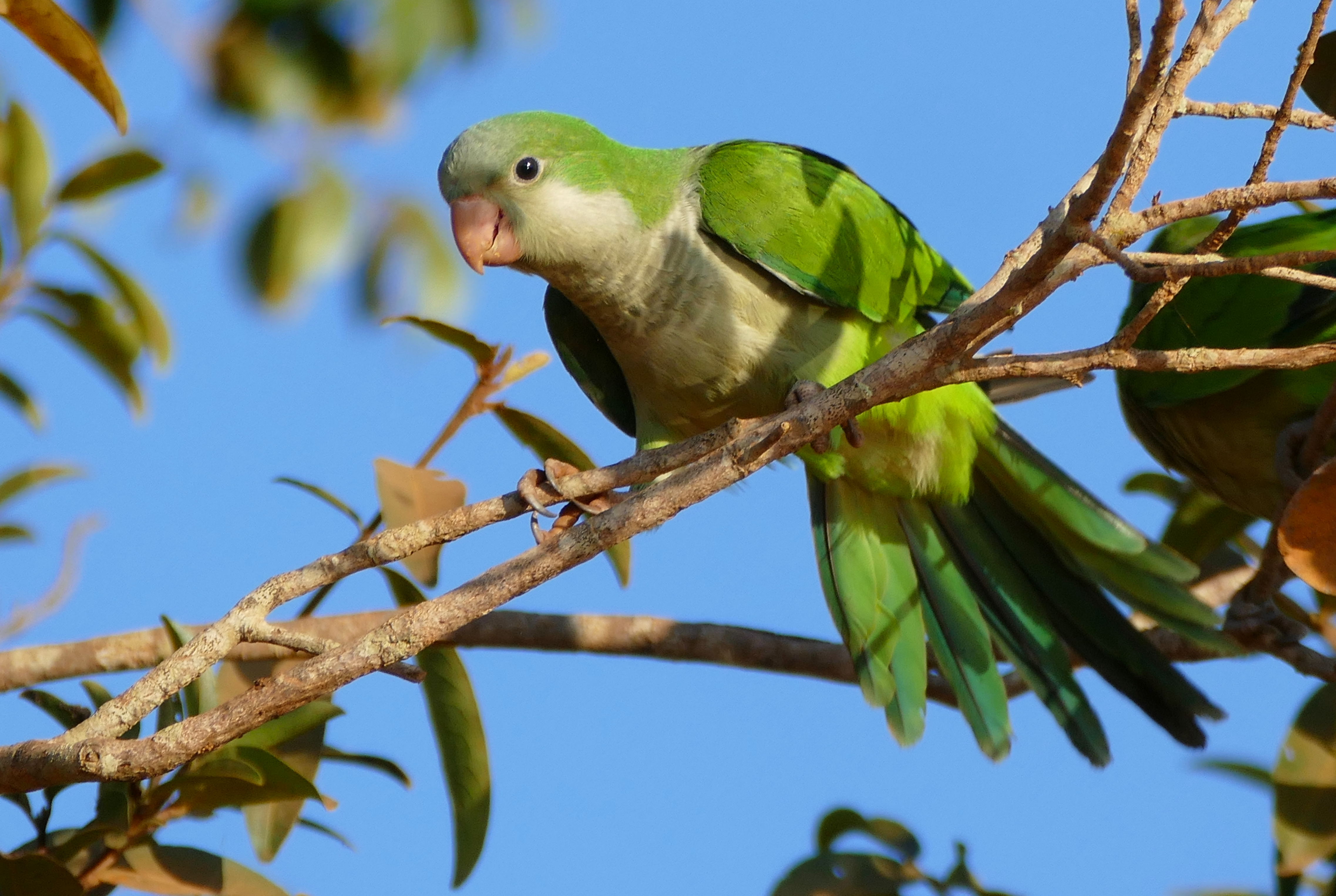 Transpantaneira, Poconé, Mato Grosso, BRAZIL